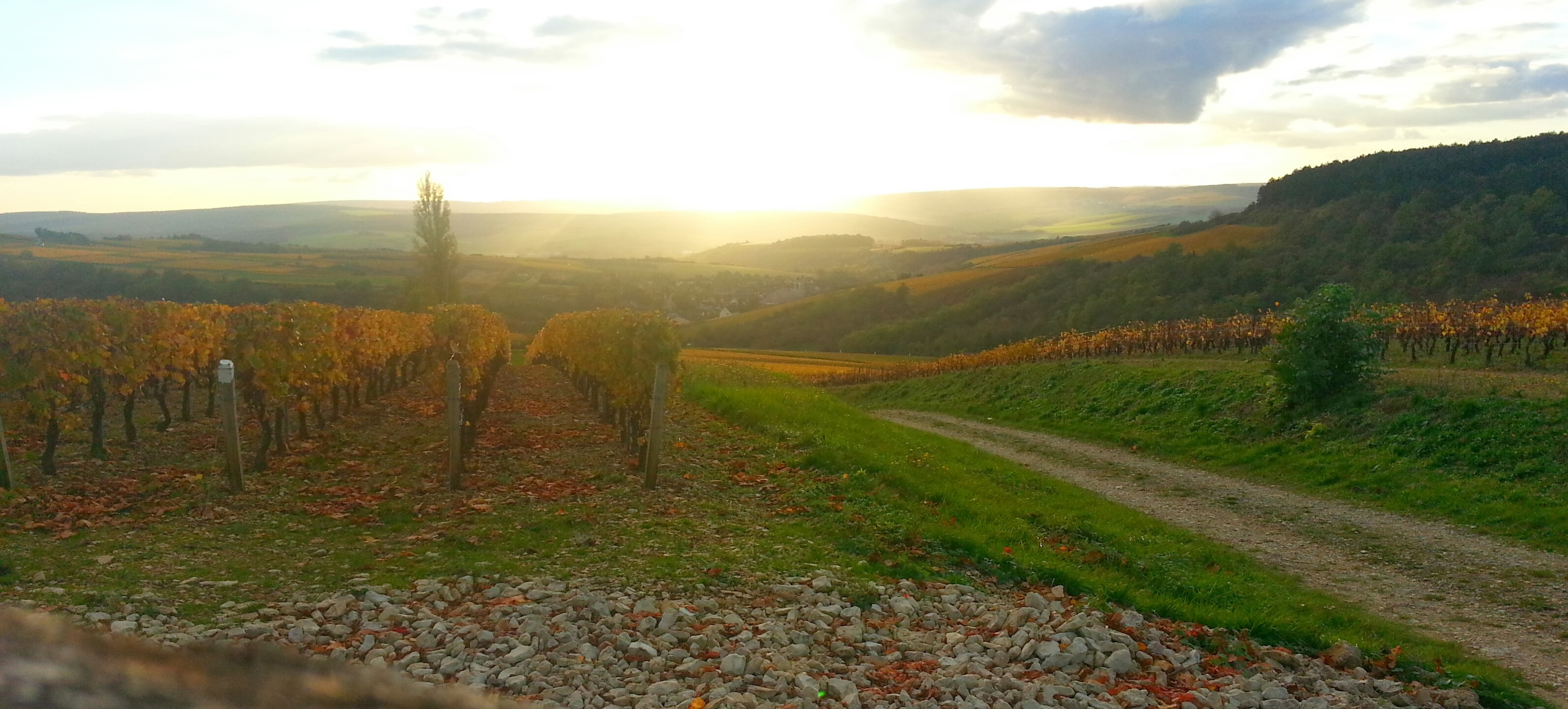 Vignoble au soleil couchant, en amont d'Irancy (vers Auxerre, Yonne)